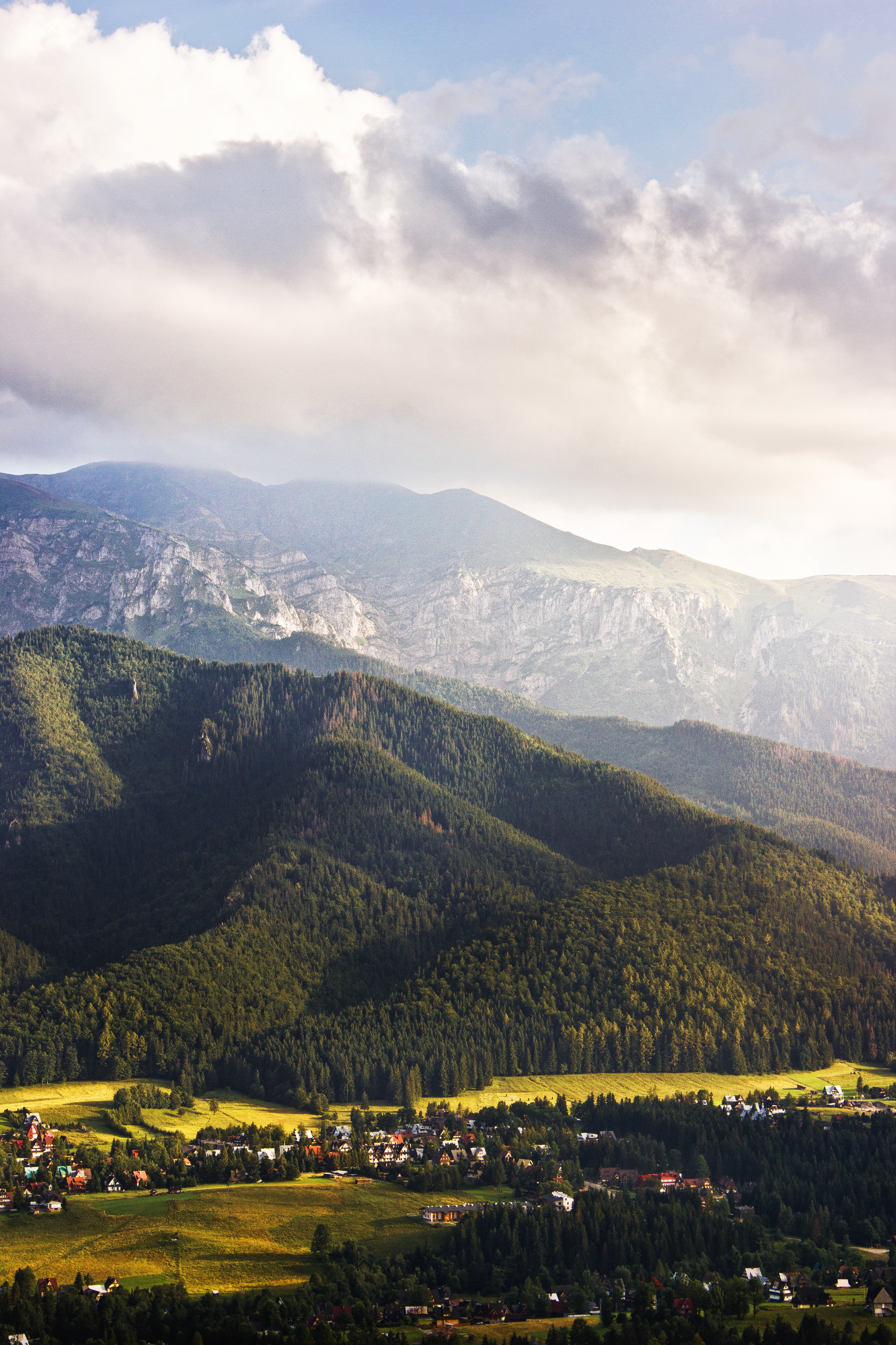 Obszar specjalnej ochrony ptaków Tatry. This is a photography of Natura 2000 protected area with ID PLC120001